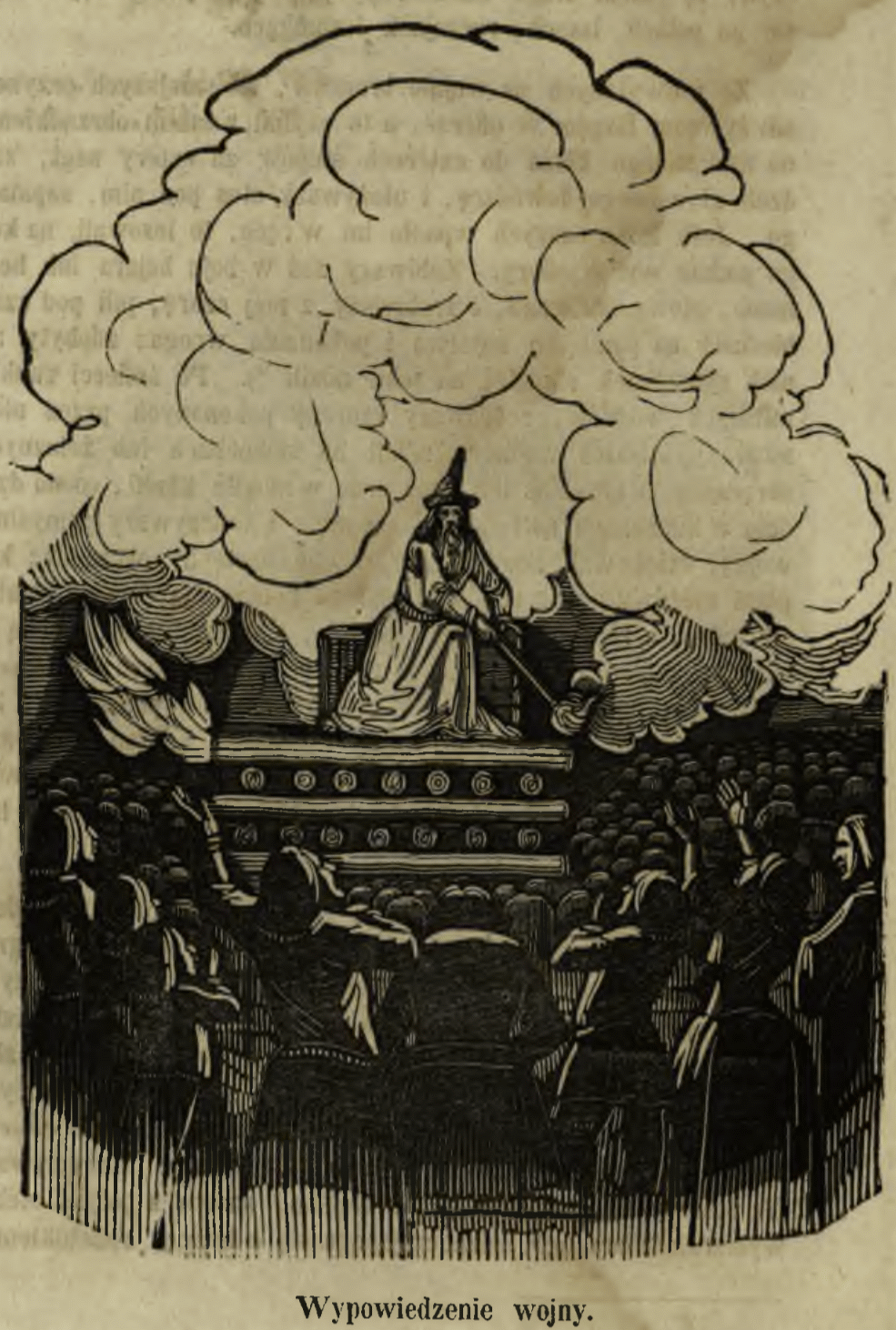 "Declaration of War", woodcut illustration to a Polish translation Būdas senovės lietuvių, kalnėnų ir žemaičių by Simonas Daukantas